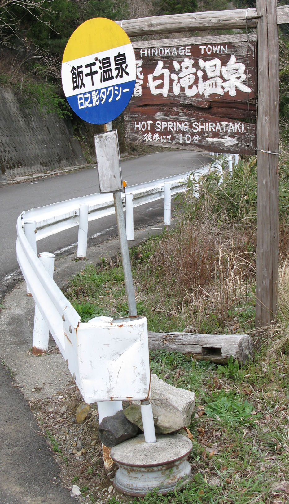 日之影タクシー（宮崎県） 乗合タクシーの停留所